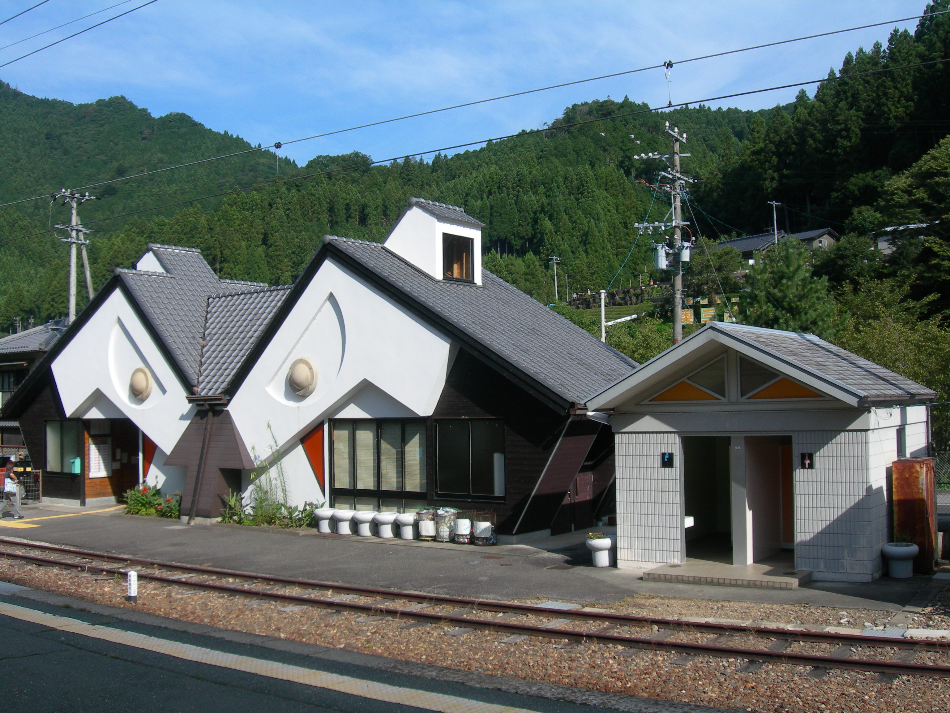 飯田線 東栄駅の駅舎をホーム側(裏側)から撮影したもの